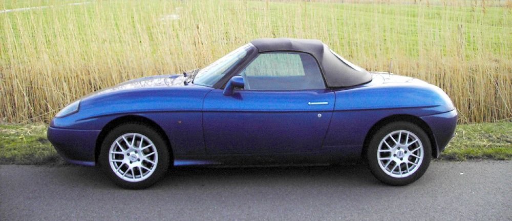 Fiat Barchetta Seitenansicht